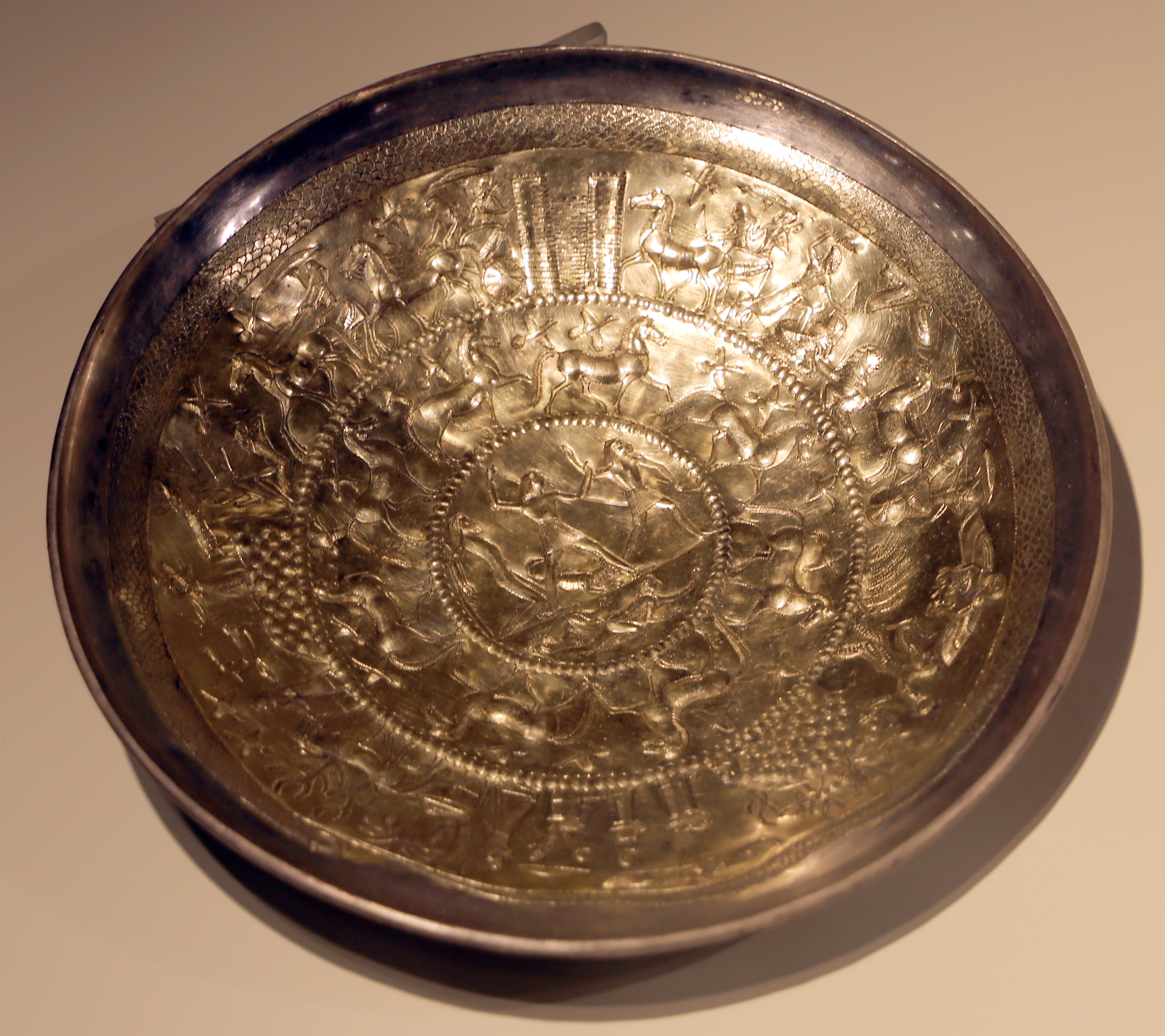 Museo nazionale etrusco di Villa Giulia This is a photo of a monument which is part of cultural heritage of Italy.